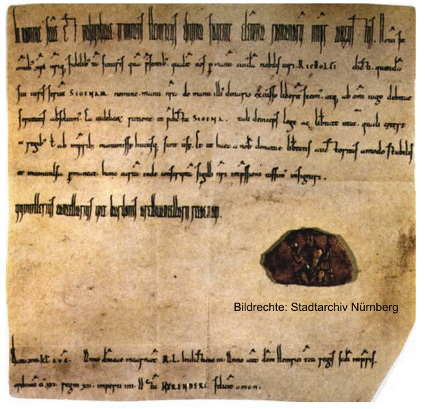 Escaneo del certificado original. Archivo histórico de Nüremberg.